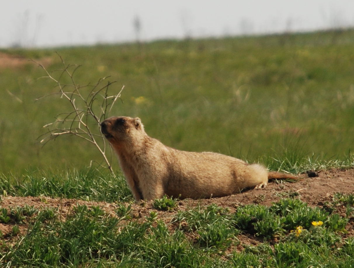 Une marmotte bobak dans une réserve de steppe d'Ukraine. Retouche (recadrage) du fichier Філія ЛПЗ НАНУ "Стрільцівський степ" Marmota bobac 2.jpg posté sur commons par @GalinaGouz.